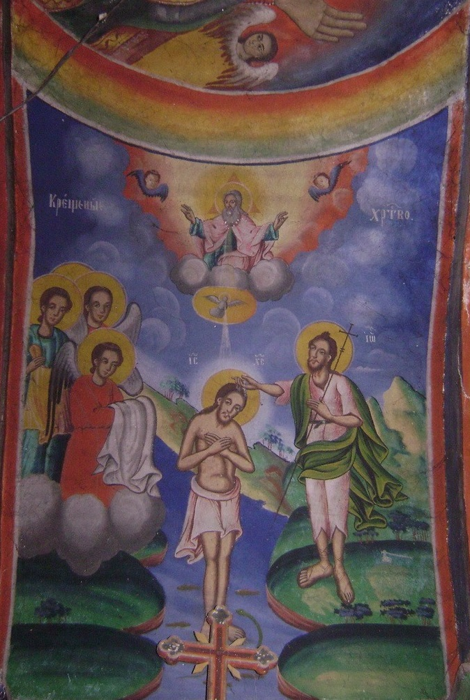 Црква „Свети Константин и Елена“, село Загорани: Дел од фрескоживописот.